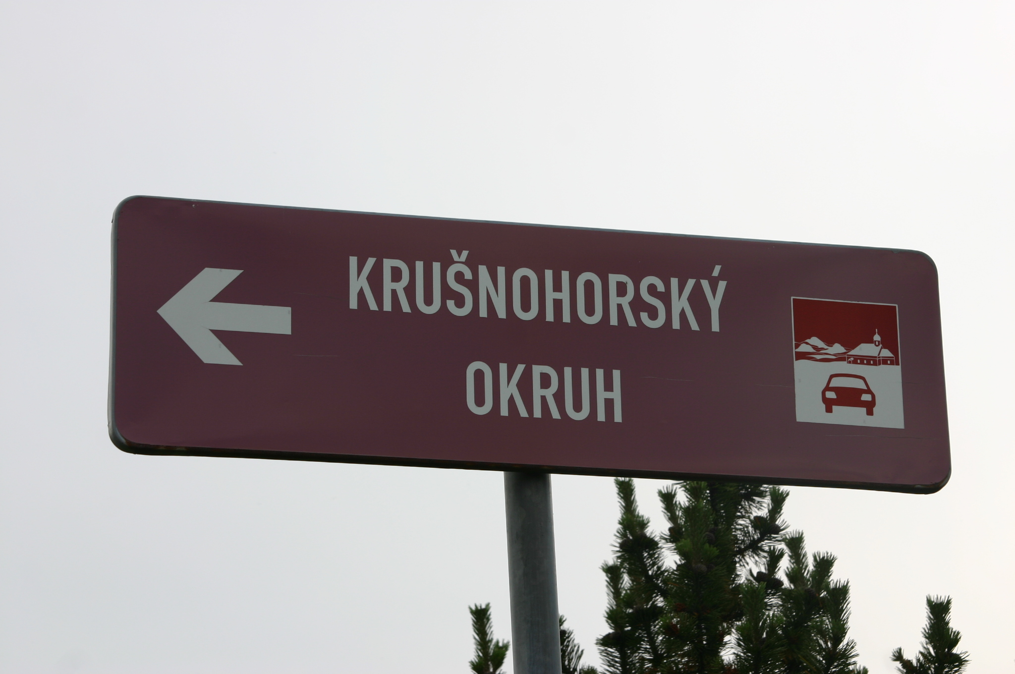 Značení Krušnohorského okruhu v okrese Most